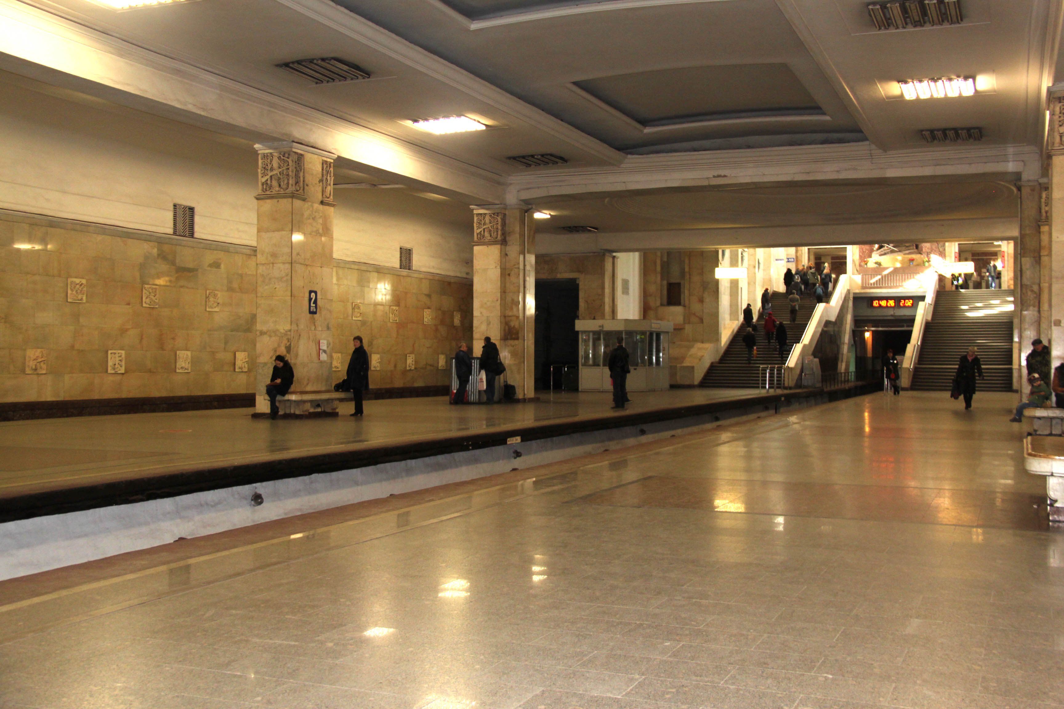 Станции метро Партизанская